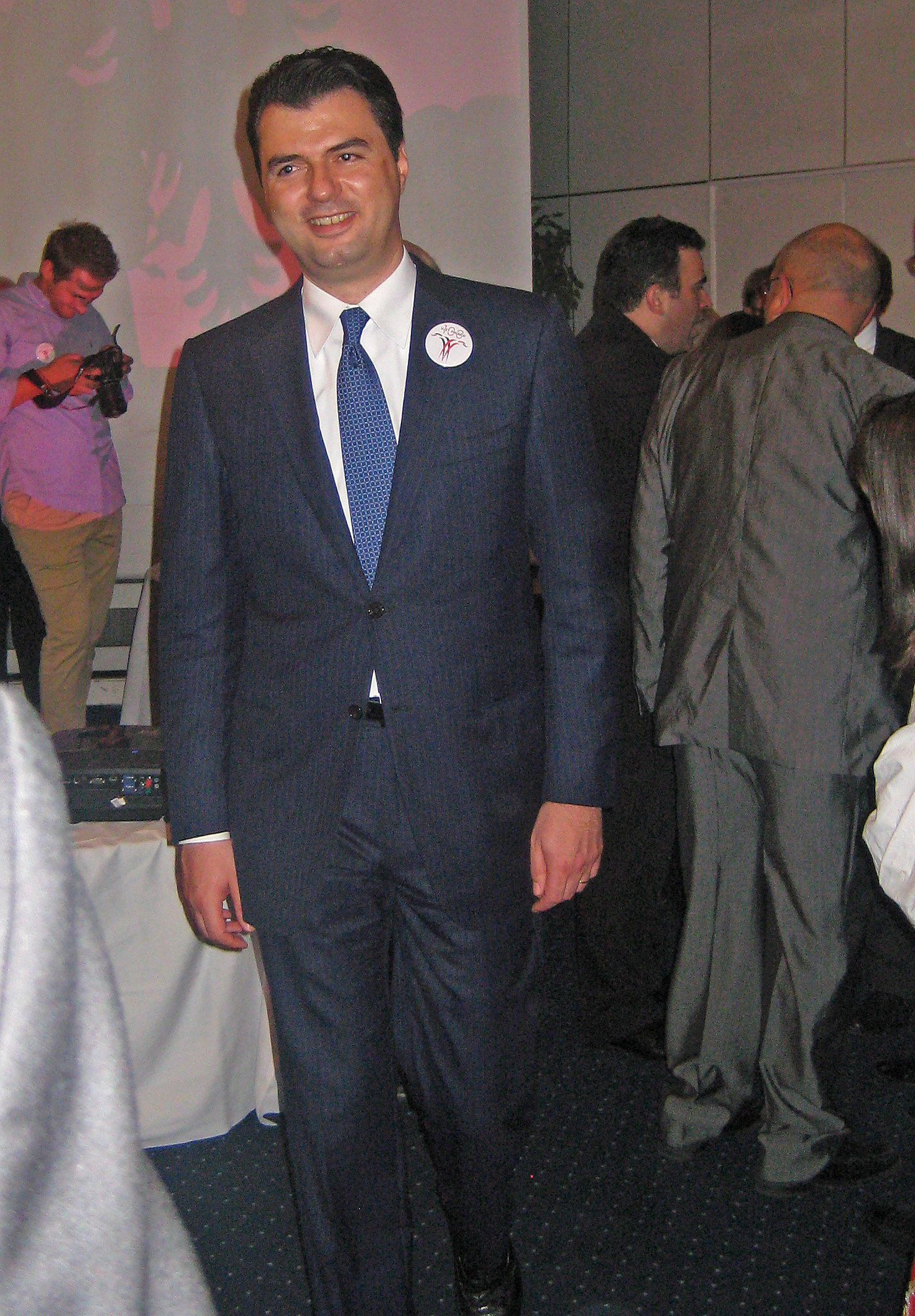 Lulzim Basha në Rapperswil, Zvicër